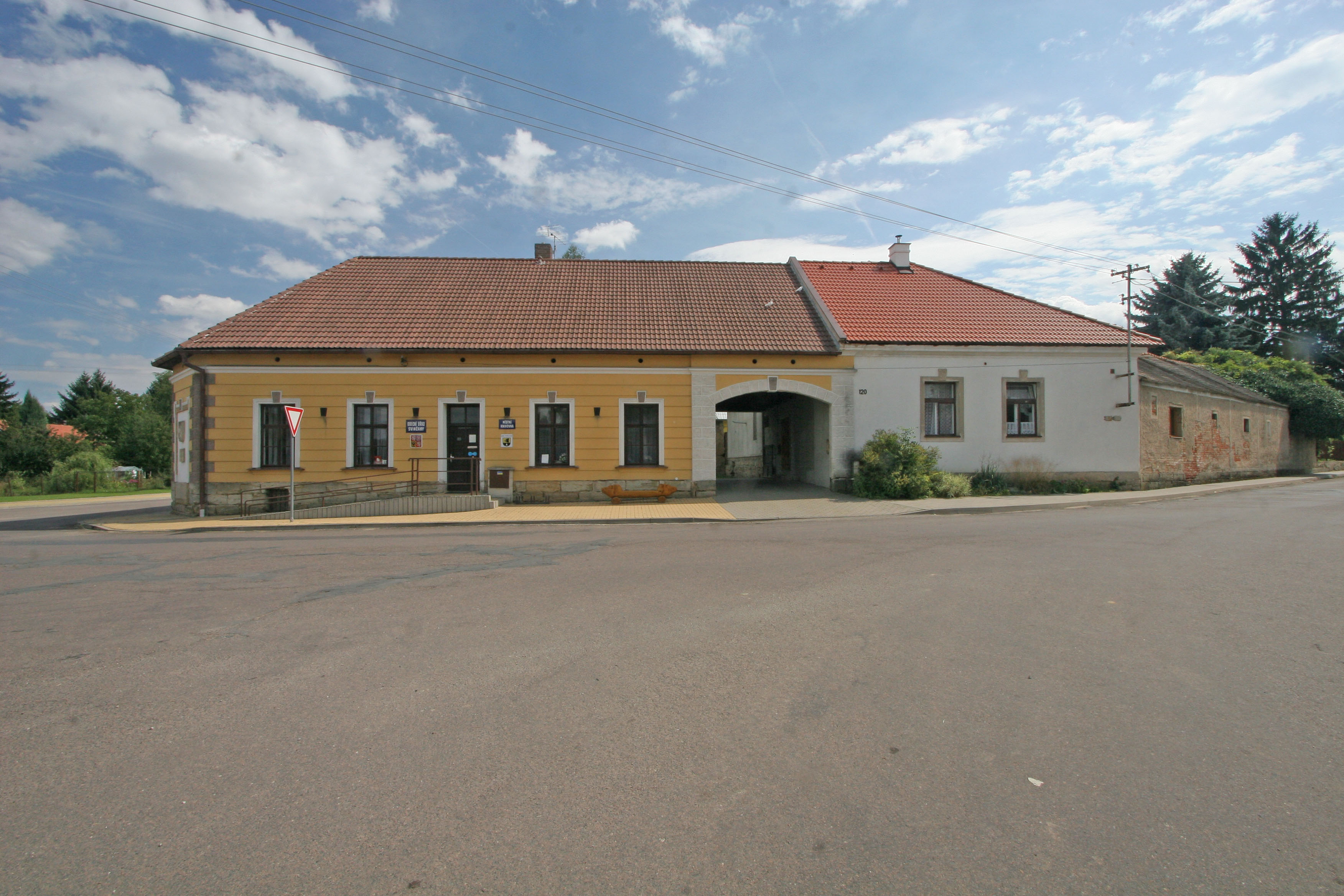 Svinčany obecní úřad